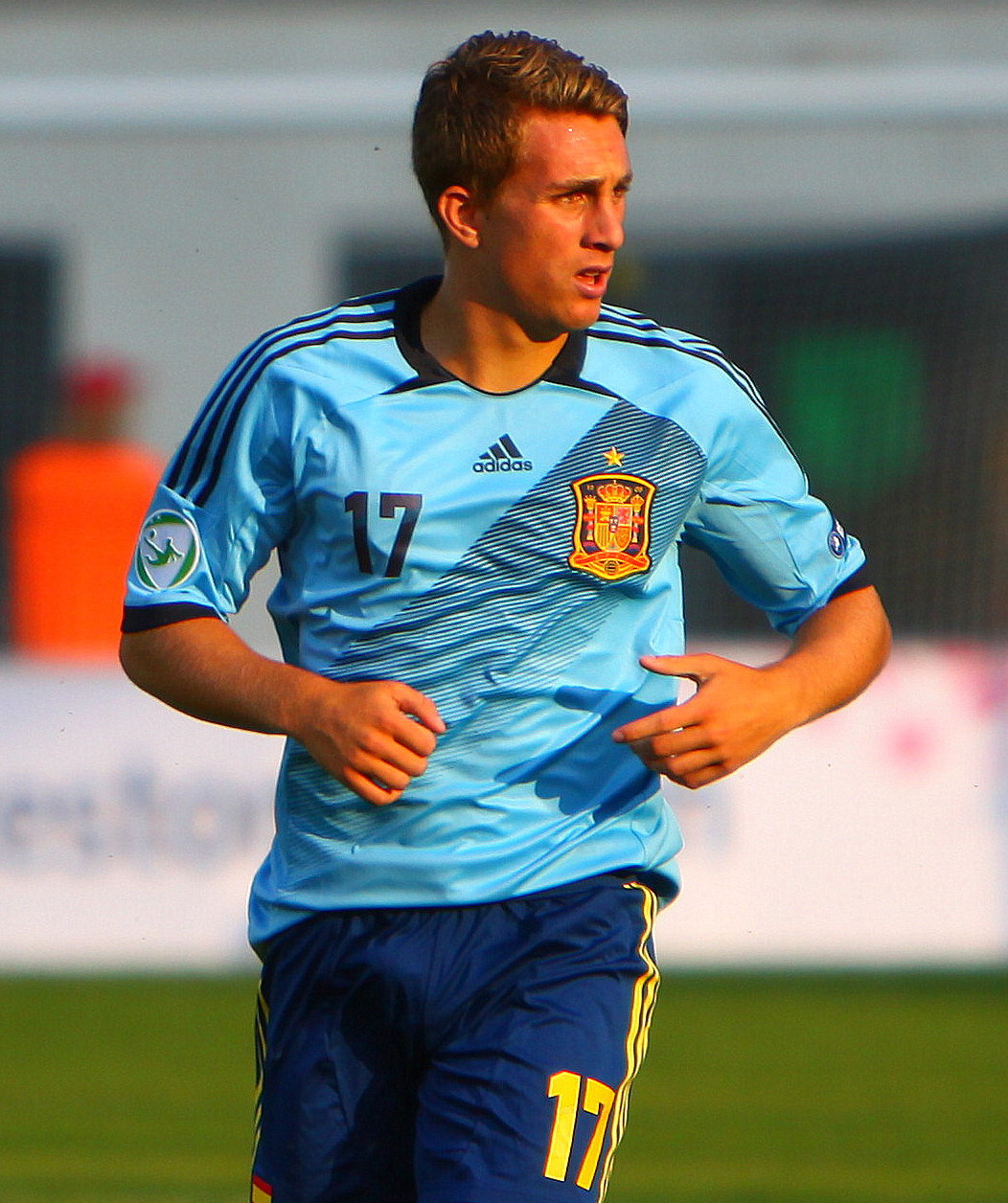 U-19 Portugal vs Spain.